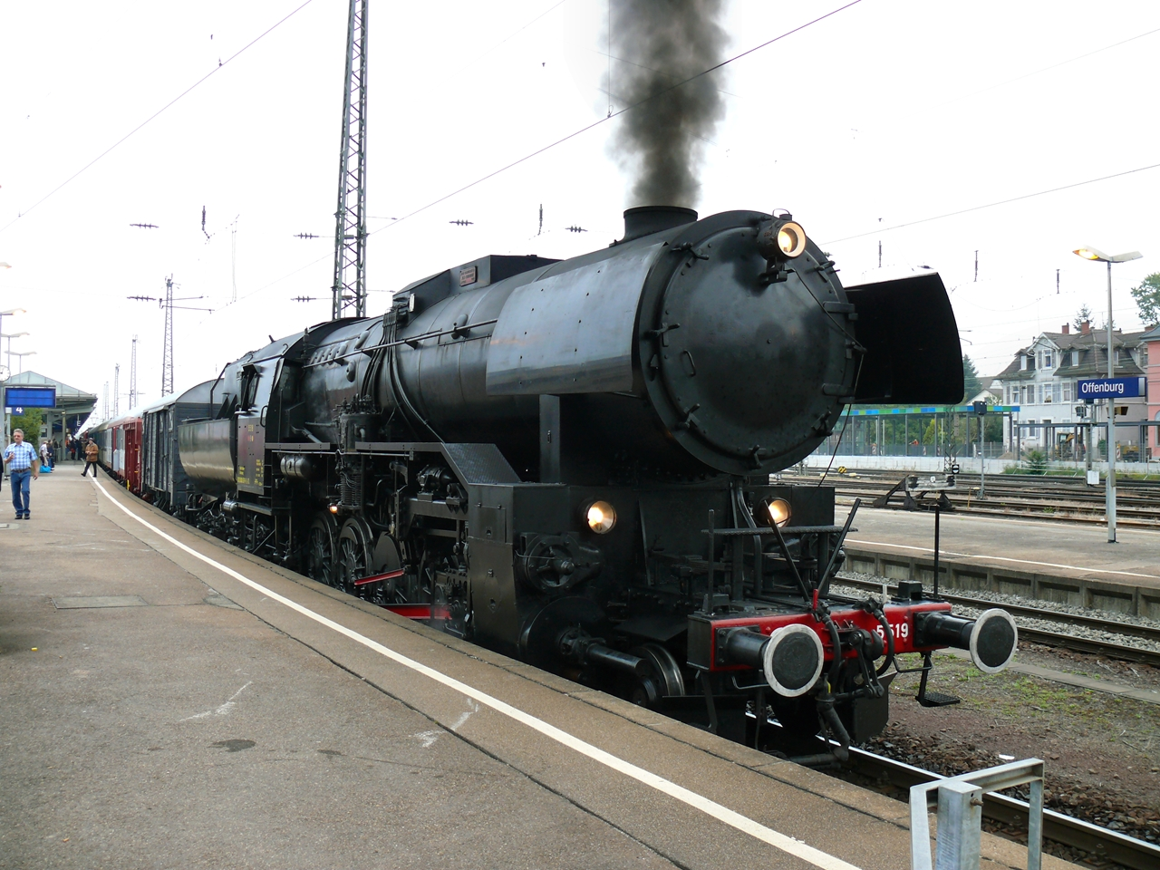 CFL 5519 til Offenburg.